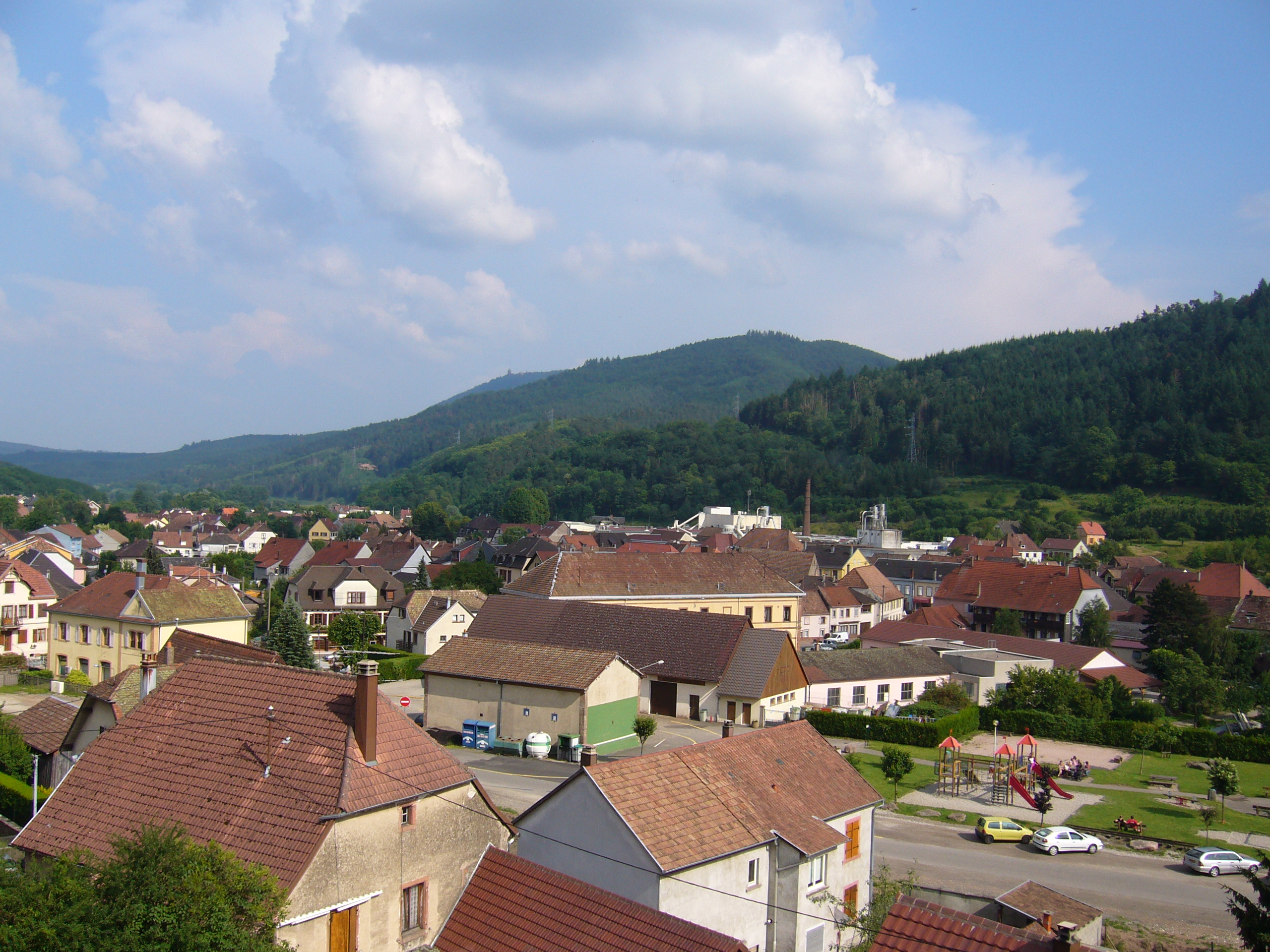 Lièpvre 010.JPG